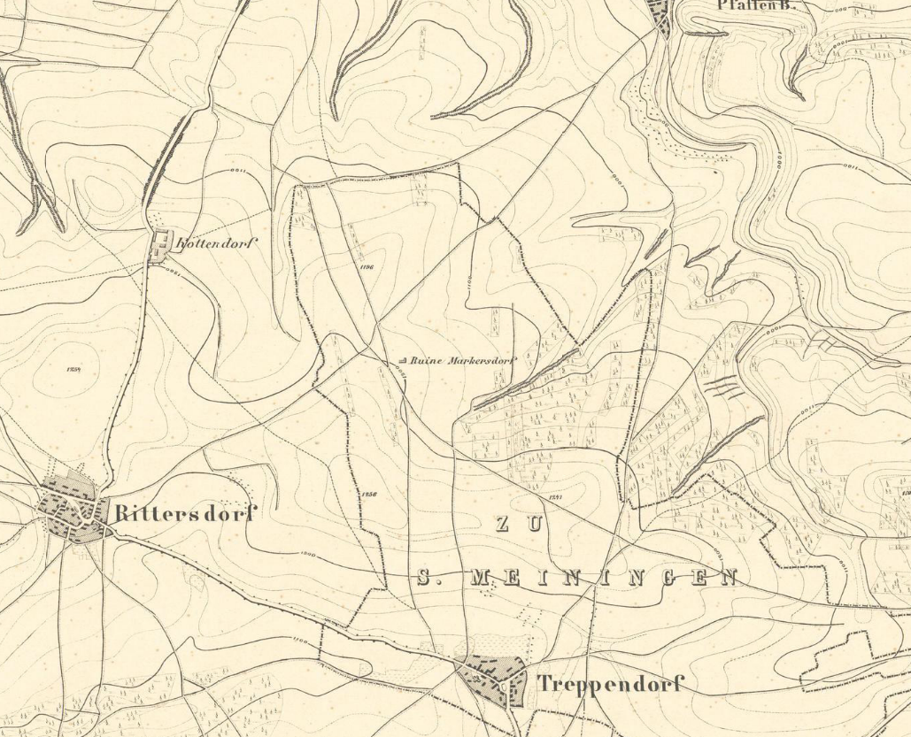 Ausschnitt mit Markersdorf und den umgebenden Dörfern Kottendorf, Rittersdorf und Treppendorf aus der Karte der Kgl. Preuss. Landesaufnahme von 1888, Topographische Karte Nr. 5133.